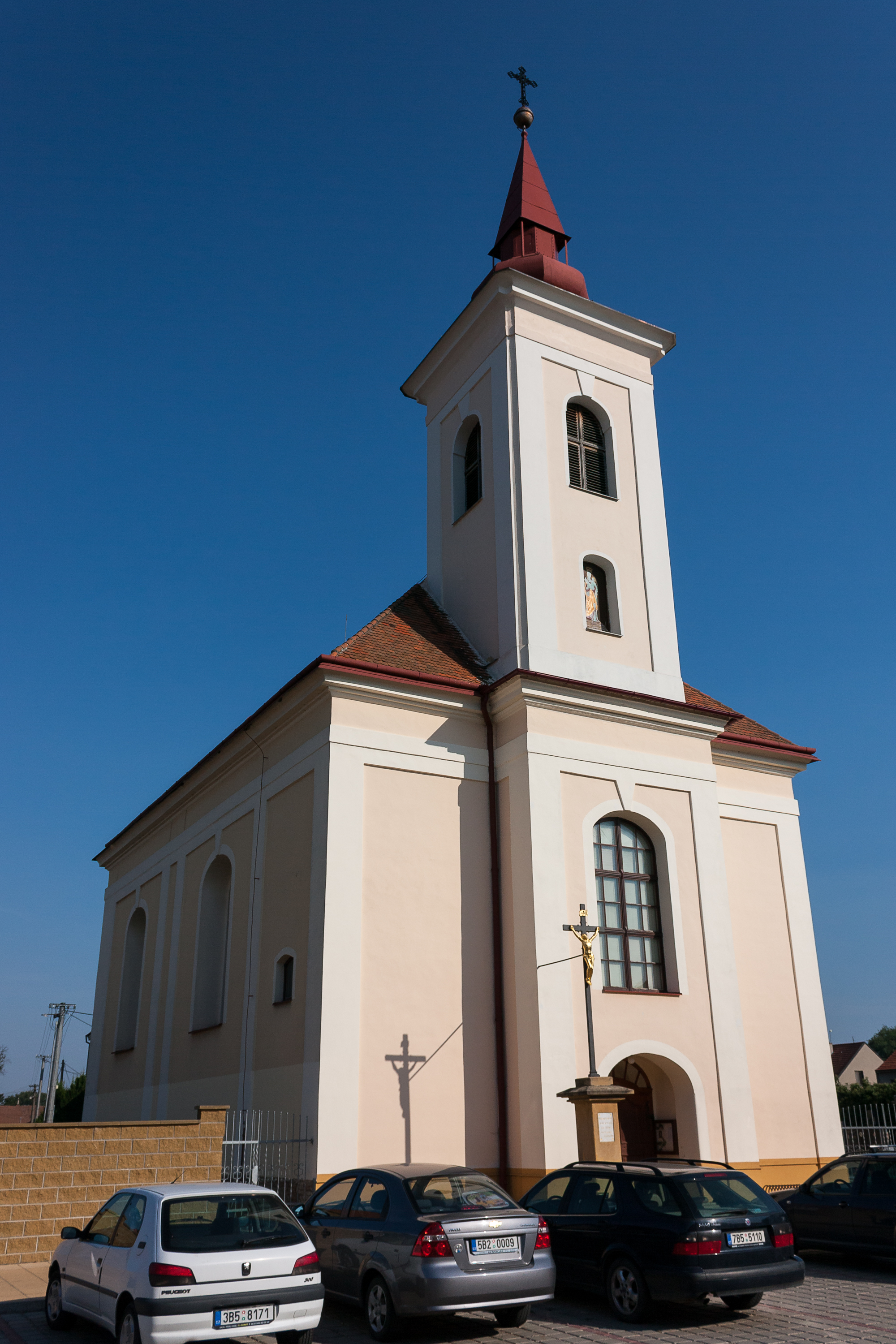 Kostel Nanebevzetí Panny Marie (Unkovice), v centru obce, Unkovice